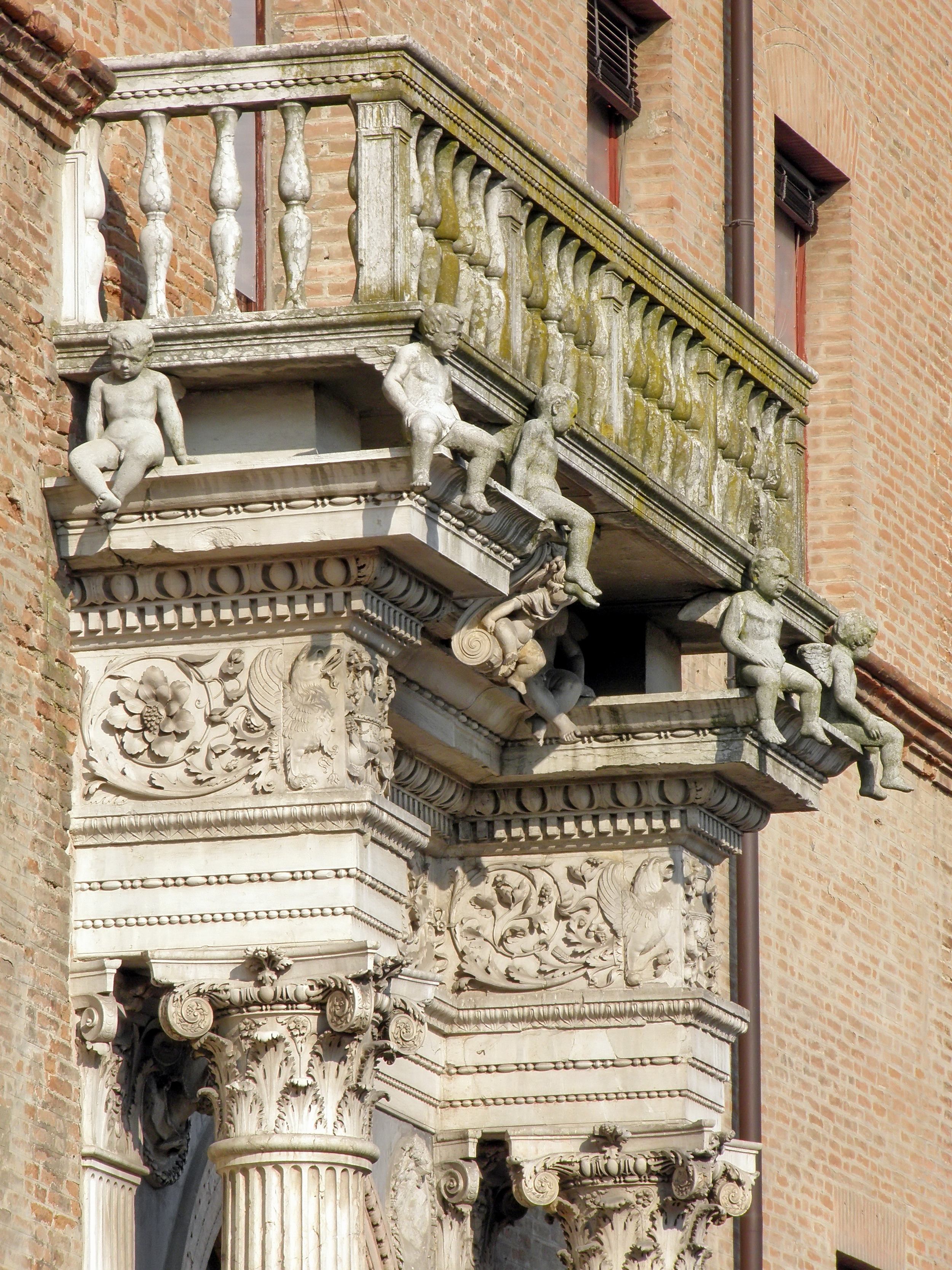 Palazzo Prosperi Sacrati, Ferrara - Italia.